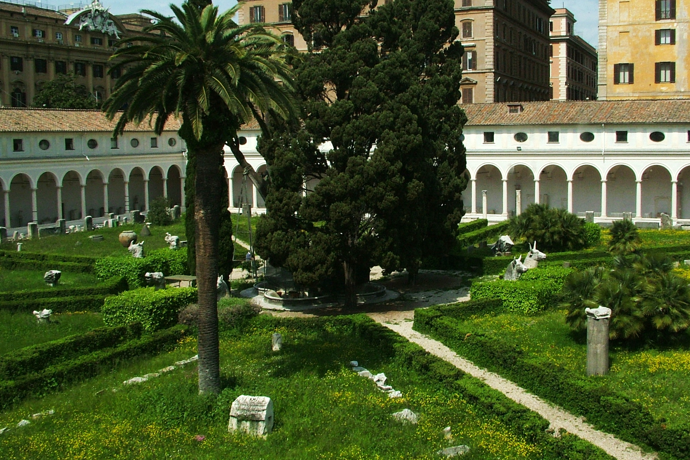 Emlékkert etruszk leletekkel (Etruszk Nemzeti Múzeum, Róma)